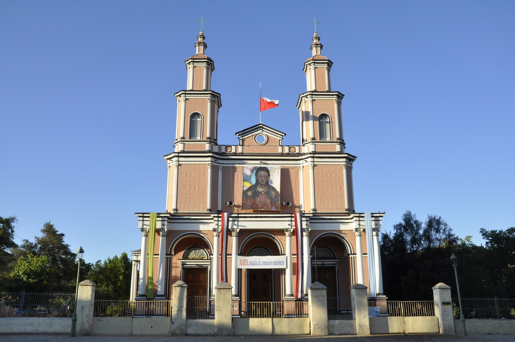 Iglesia grande de Andacollo This is a photo of a national monument in Chile: 604